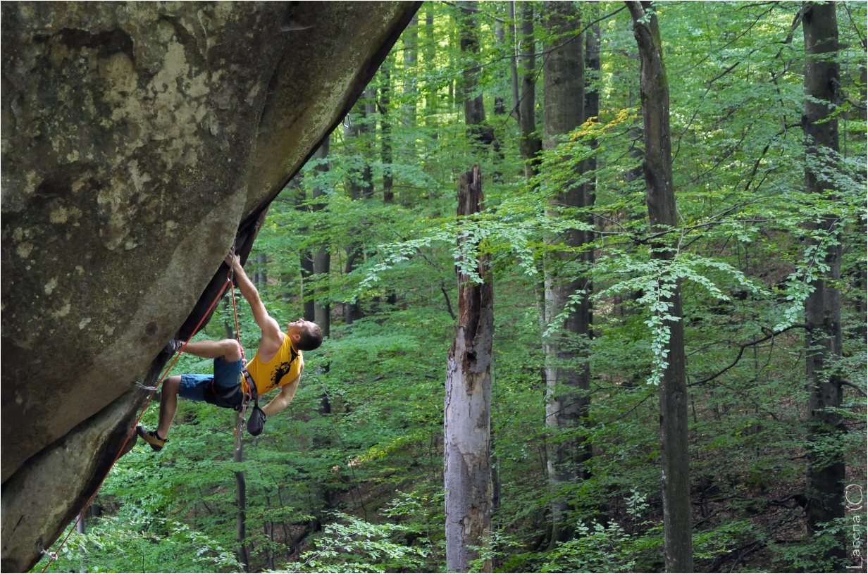 Проходження маршруту 8с Спазм на скелях Довбуша